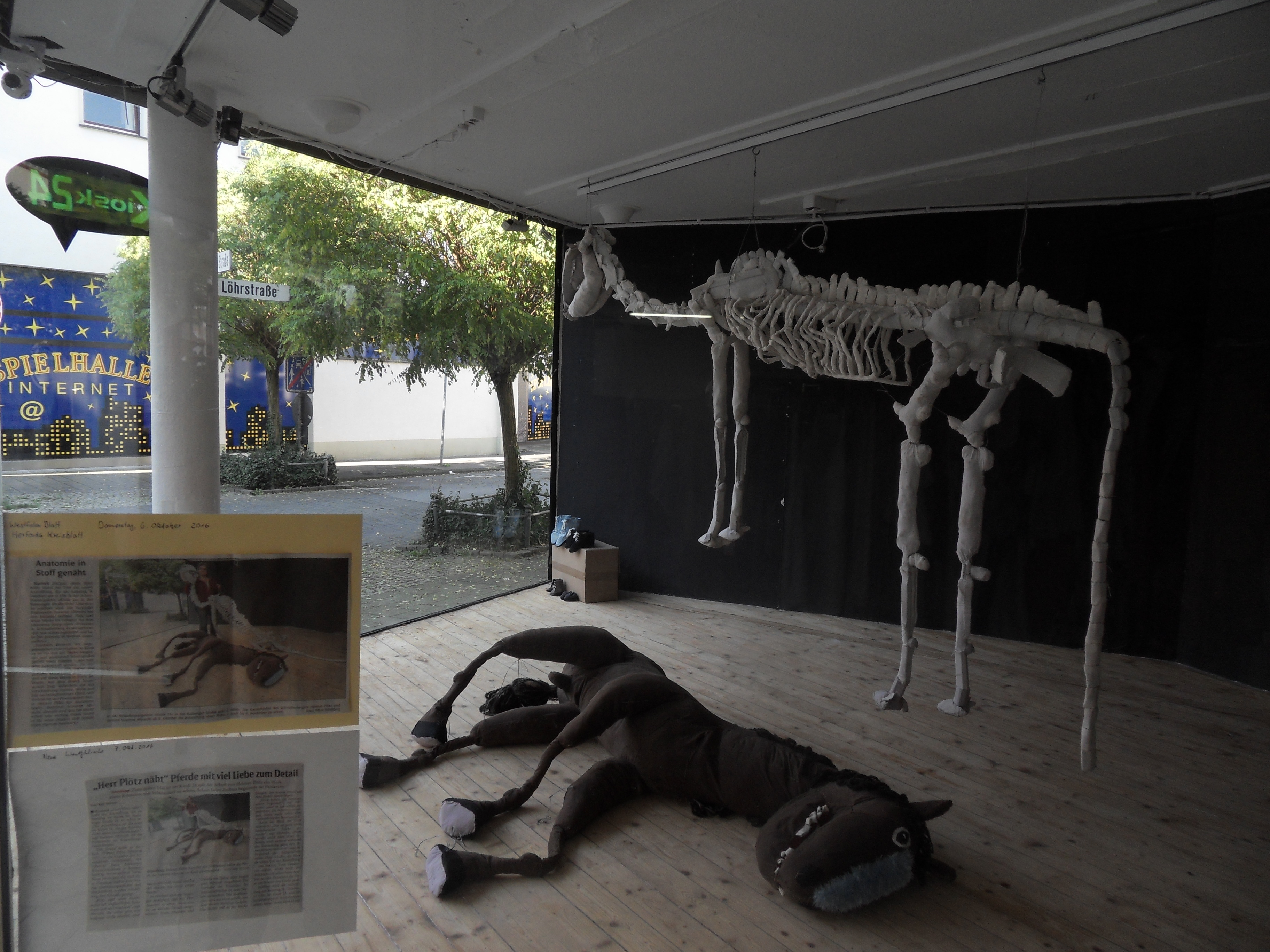 Beispiel für eine Ausstellung im Kiosk 24 von außen fotografiert